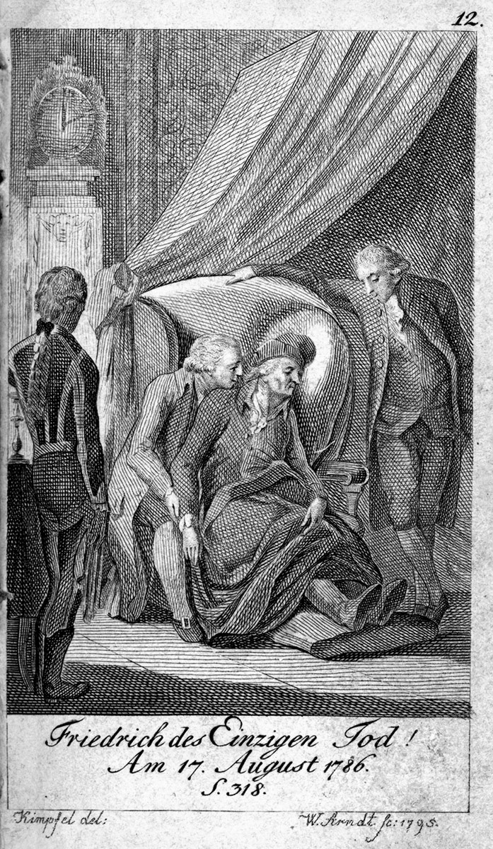 Tod Friedrichs II. (des Großen) von Preußen, aus: Jahrbuch der Preussisch-Brandenburgischen Staatengeschichte. Siebenter Theil, Berlin, 1796.